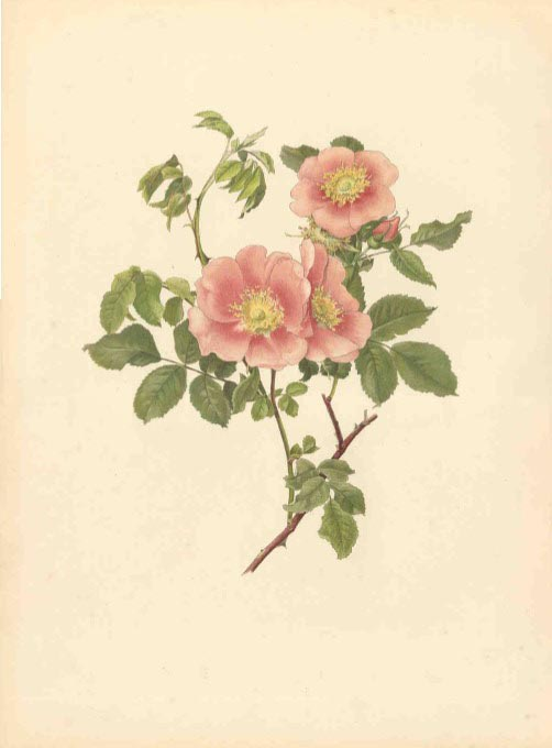 Шиповник рыхлый